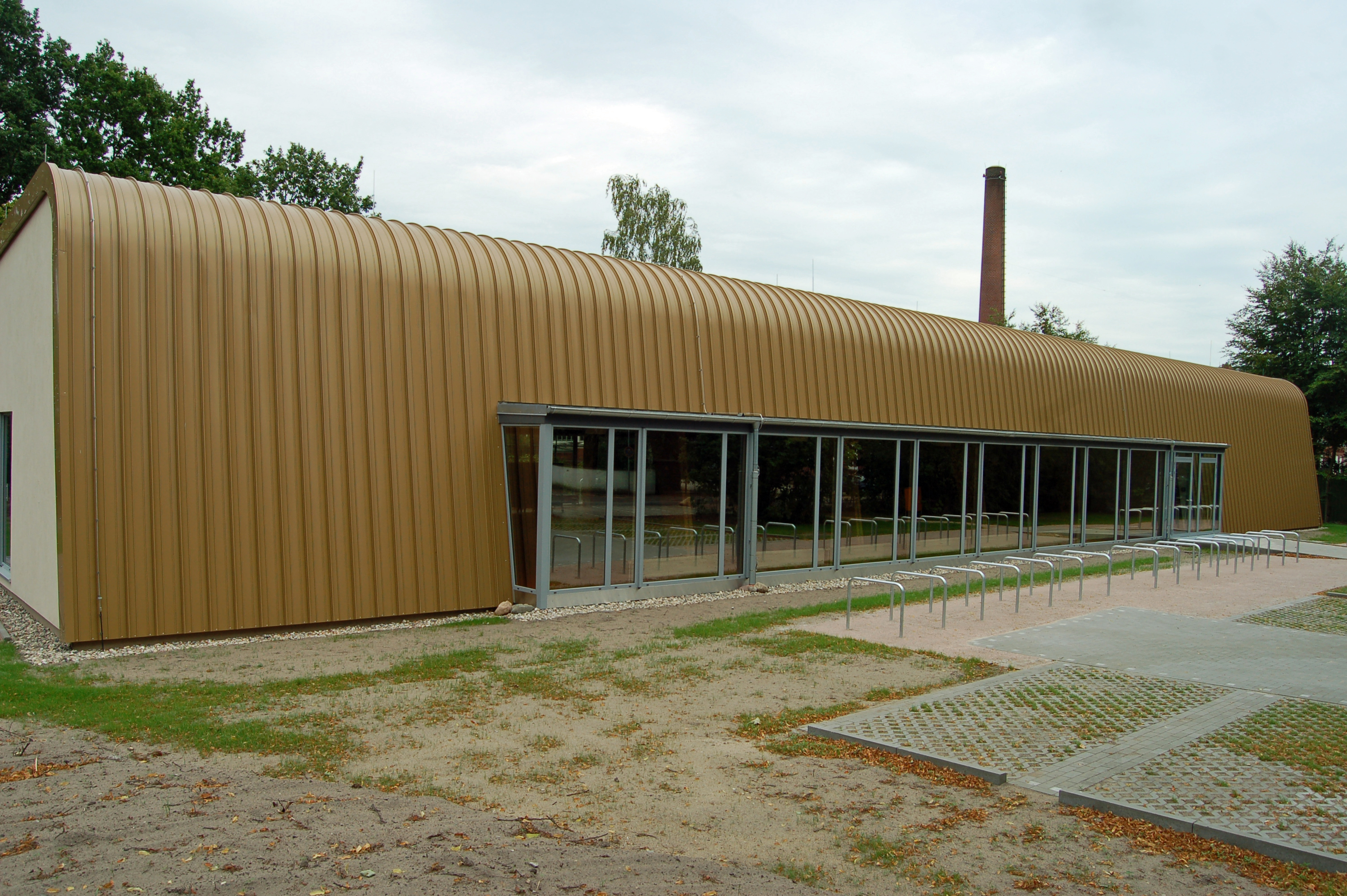 Die Schulmense „KantUene“ aus dem Jahr 2010 Der Name der neuen Uetersener Mensa lautet "KantUene". Die Klasse 4 b der Grundschule Roggenfeld im Schuljahr 2009/10 hatte Rahmen eines Wettbewerbs für die Namensfindung diesen Vorschlag. Alle Schulen am Schulstandort in der Seminarstraße (Grundschule, Hauptschule, Realschule und Gymnasium) hatten Vorschläge eingereicht. Der Arbeitskreis der Mensa wählte unter 20 Vorschlägen den Namen "KantUene" aus. Die Viertklässler der Schule am Roggenfeld hatten das "i" im Wort Kantine einfach durch ein "Ue" wie Uetersen ersetzt.